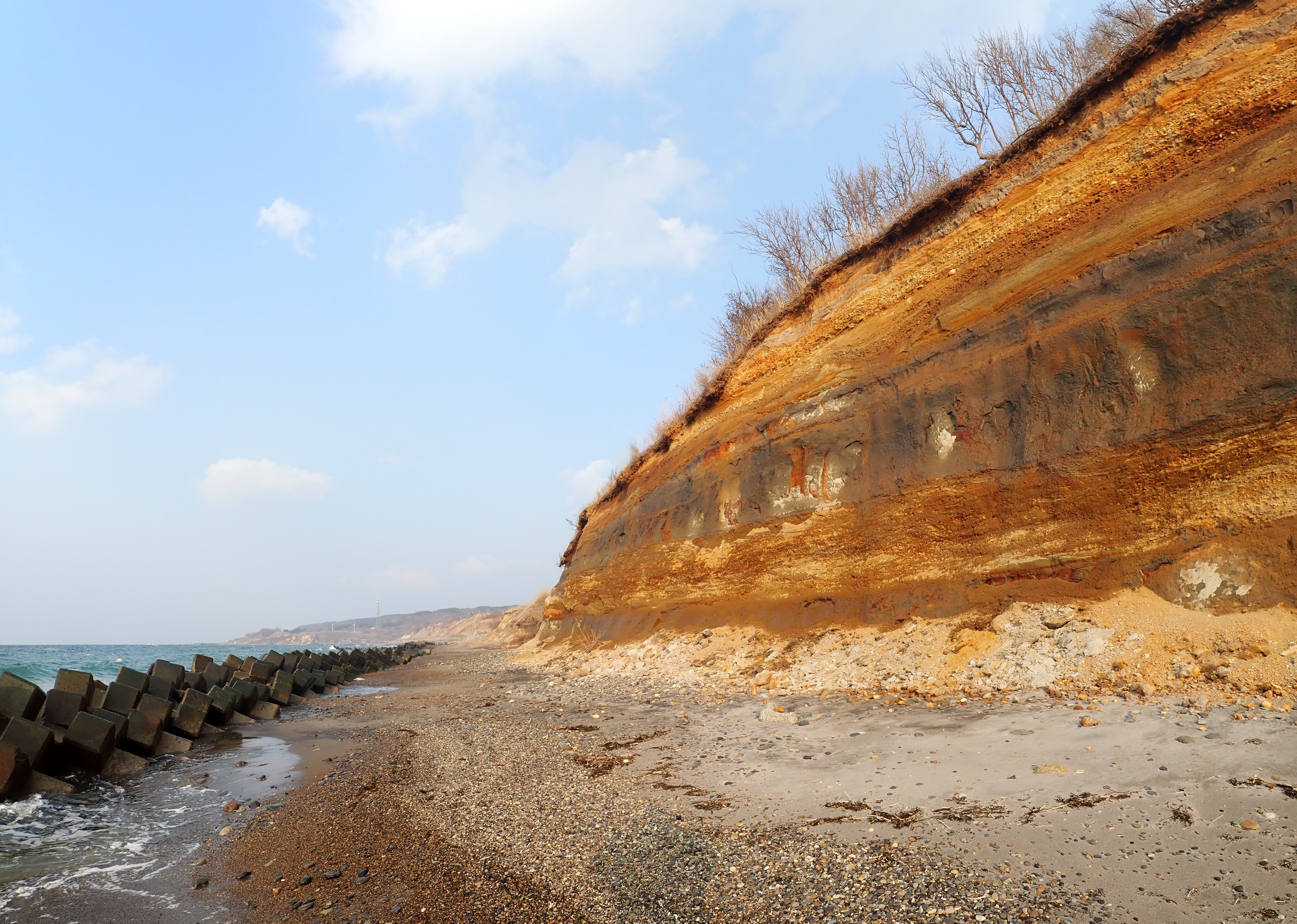 脆い地層（上から砂礫層・火山灰と思われる灰色の層が交互に計６層ほど堆積）。 面白いことに異なる地層が交互に堆積しているにも関わらず、その崖の部分は常に垂直に近い状態で崩落を繰り返していること。 海岸段丘。 礫（れき）。 波による海岸の侵食。 消波ブロックによる緩和措置。 青森県今別町山崎中宇田～袰月（高野崎より西側）は舎利石の産地。段丘より崩れ落ちた砂礫の中に含まれる二酸化ケイ素を多く含む水晶（玉髄）、瑪瑙、碧玉が打ち寄せる波によって削られ水摩礫となる。中でもここだけで産出する舎利石は他の第三紀層から産出するそれら錦石と呼ばれる石よりも密度が均一なものが圧倒的に多く、その多くが採取した時点で半光沢や完全に光沢を帯びているものが多い。撮影場所：青森県今別町山崎